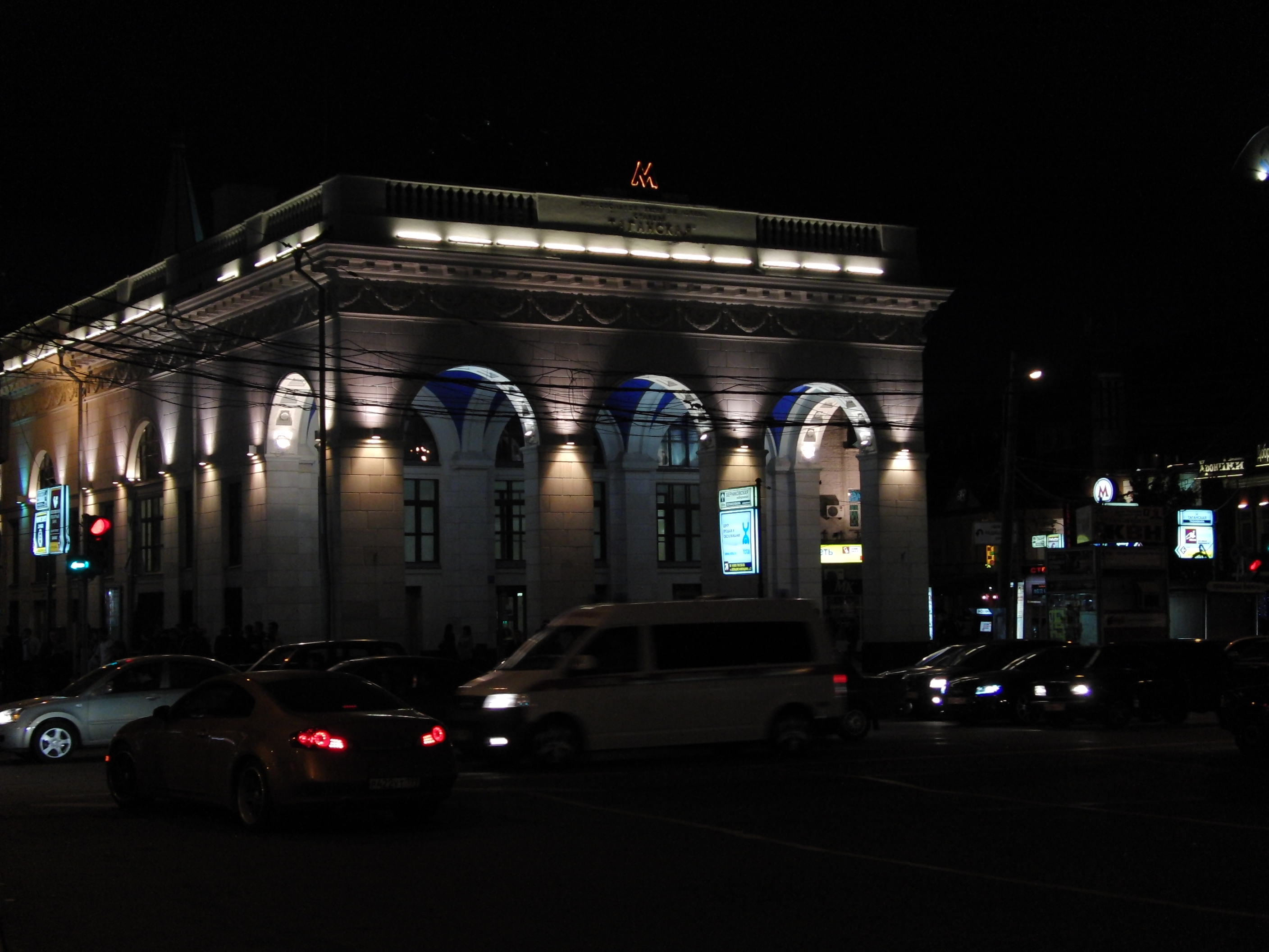 Vestibule of Taganskaya-koltsevaya station (Вестибюль станции метро Таганская-кольцевая)